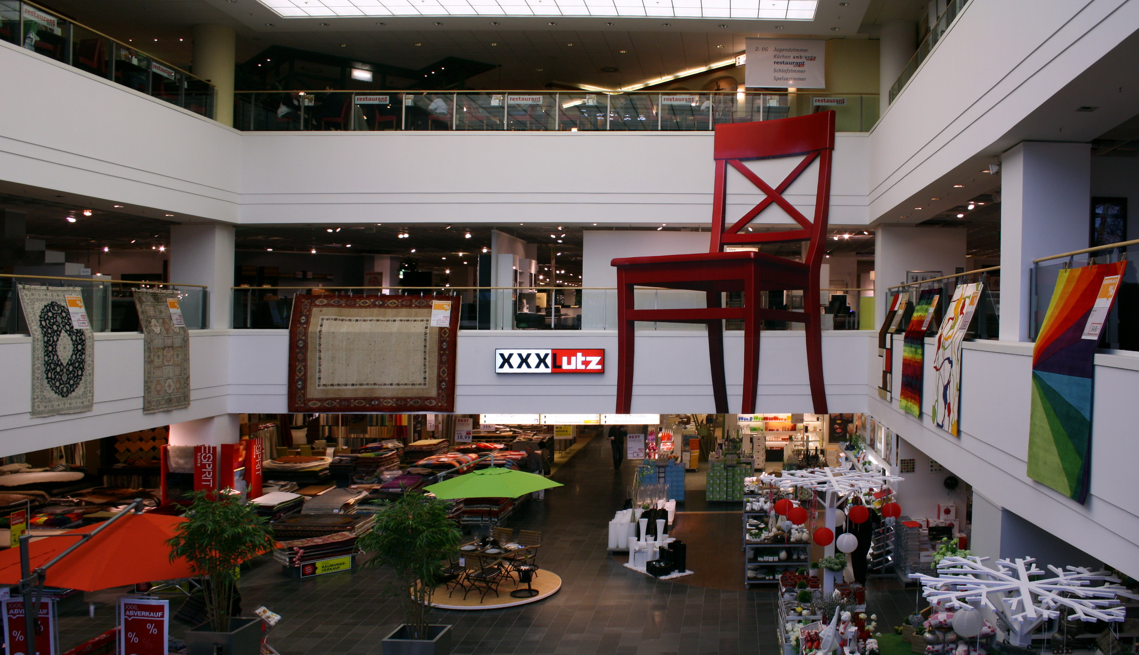 XXXLutz Möbelhaus an der Theresienhöhe in München